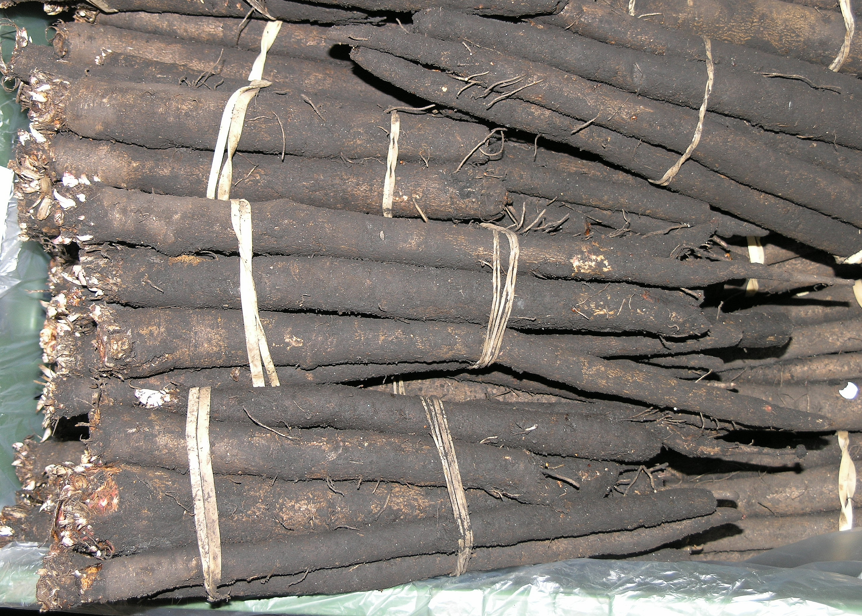 Schwarzwurzel Bundware